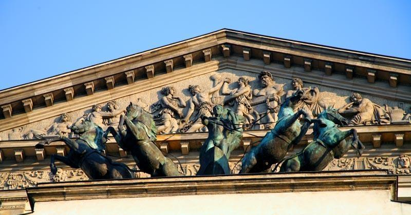 Warszawa (Polska)